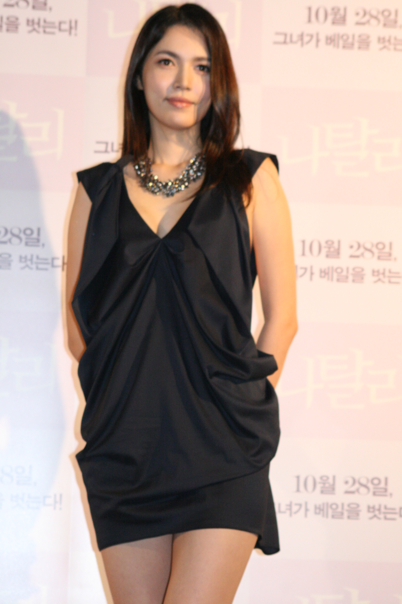 나탈리 시사회